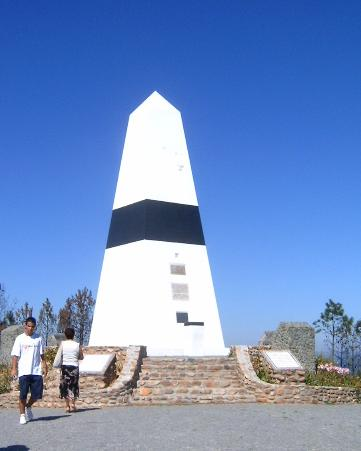 Centro geodésico de Portugal, Milriça, Vila de Rei, Portugal. Photo by Manuel Anastácio